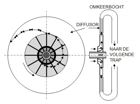 Werking van de diffuser